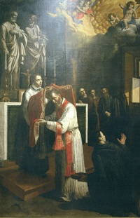 Vestizione di San Silvestro. Scuola raffaelliana marchigiana.